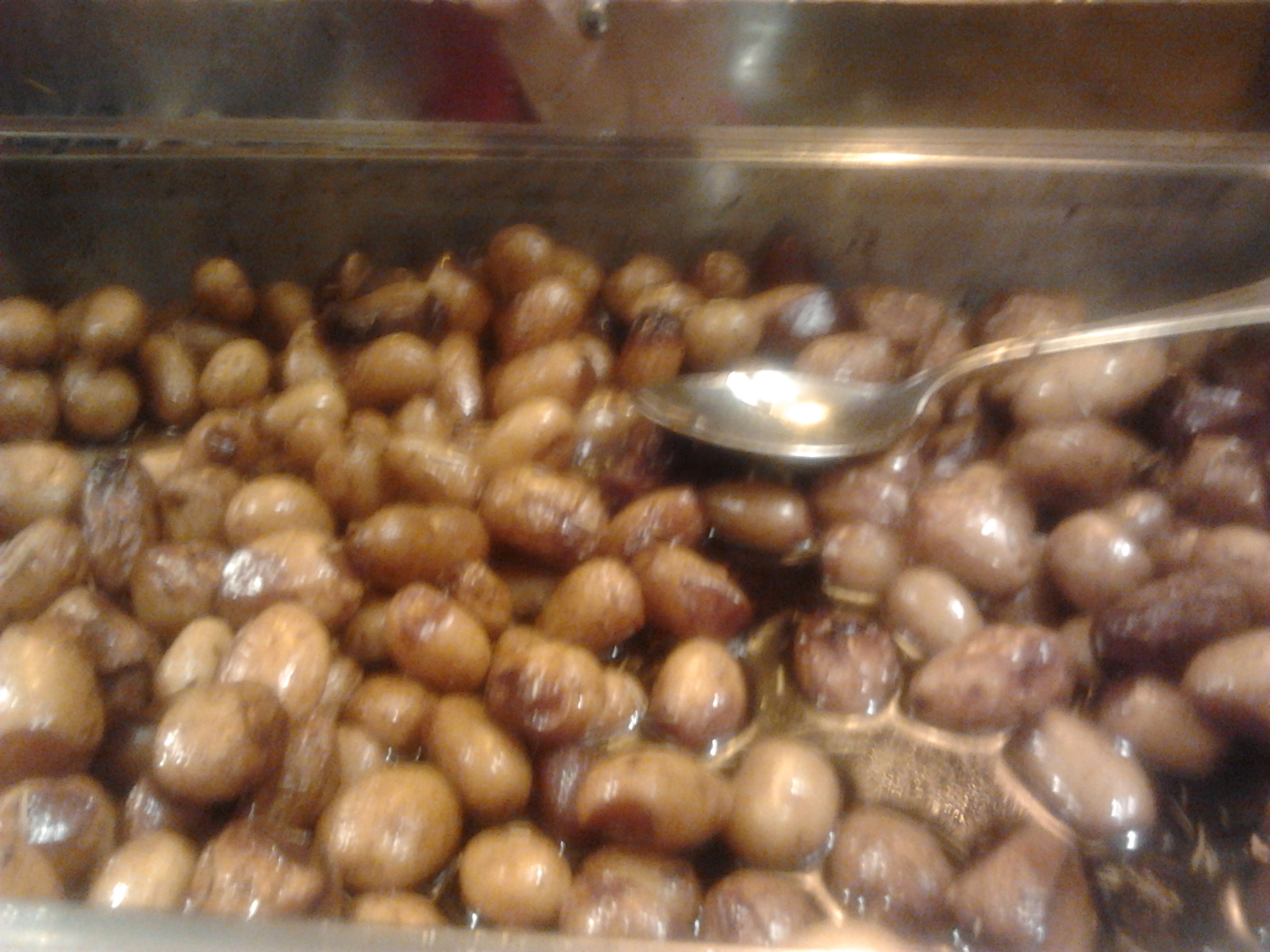 Patate novella sieglinde di Galatina cotte nel vincotto a una sagra ad acaya usando il cellulare di giovanni